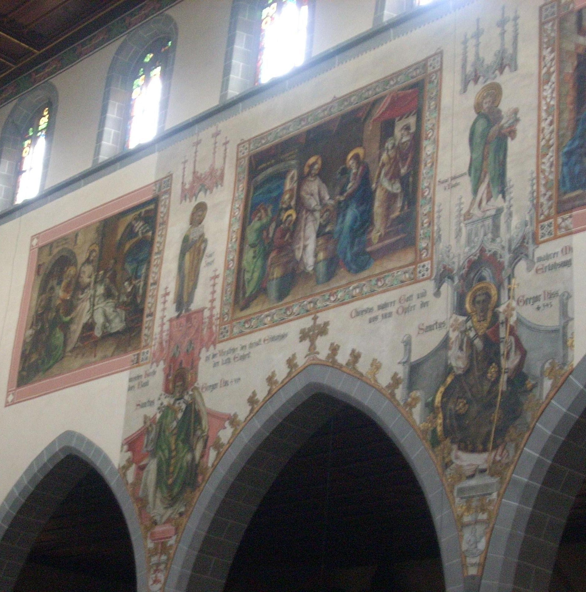 Konstanz, St. Stephan, Obergadenwand Nordseite Westjoche, Erzählbilder und Heiligendarstellungen (1910/17)